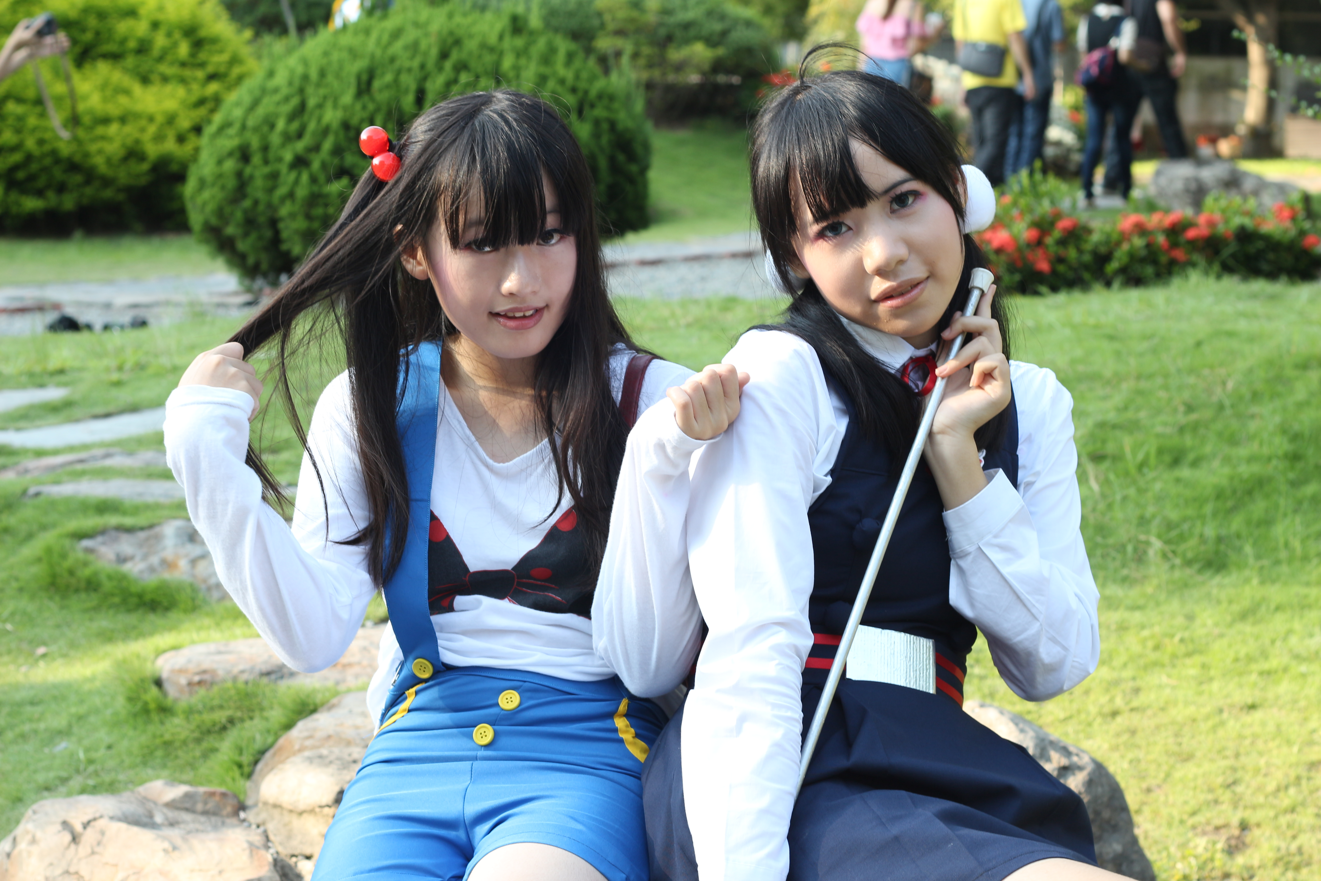 中文（台灣）: 第12屆台灣同人誌販售會台中場（CWT T12），《玉子市場》北白川餡子（左）、北白川玉子（右）cosplayer。